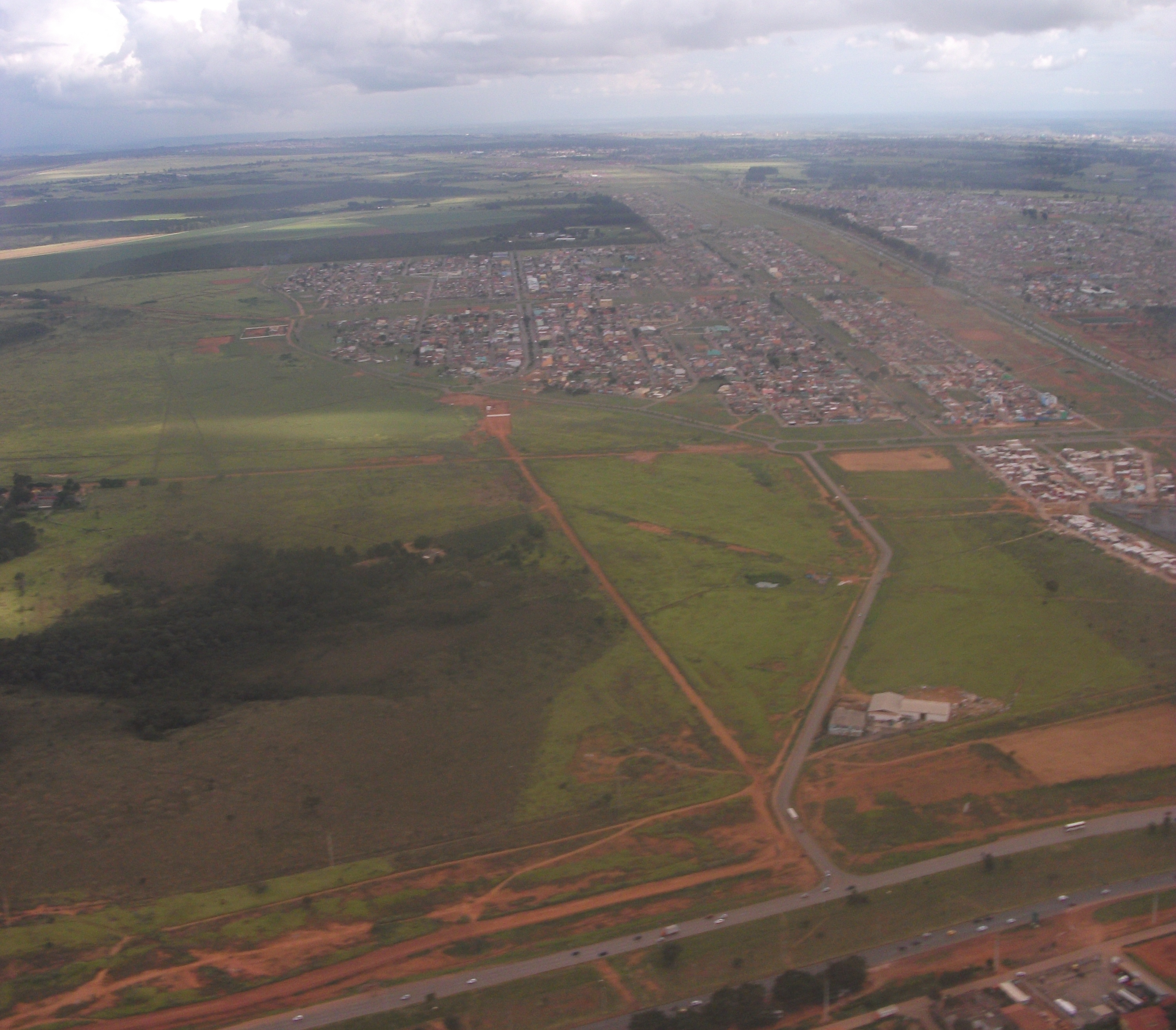 Vista parcial de Riacho Fundo II, Distrito Federal, Brasil.